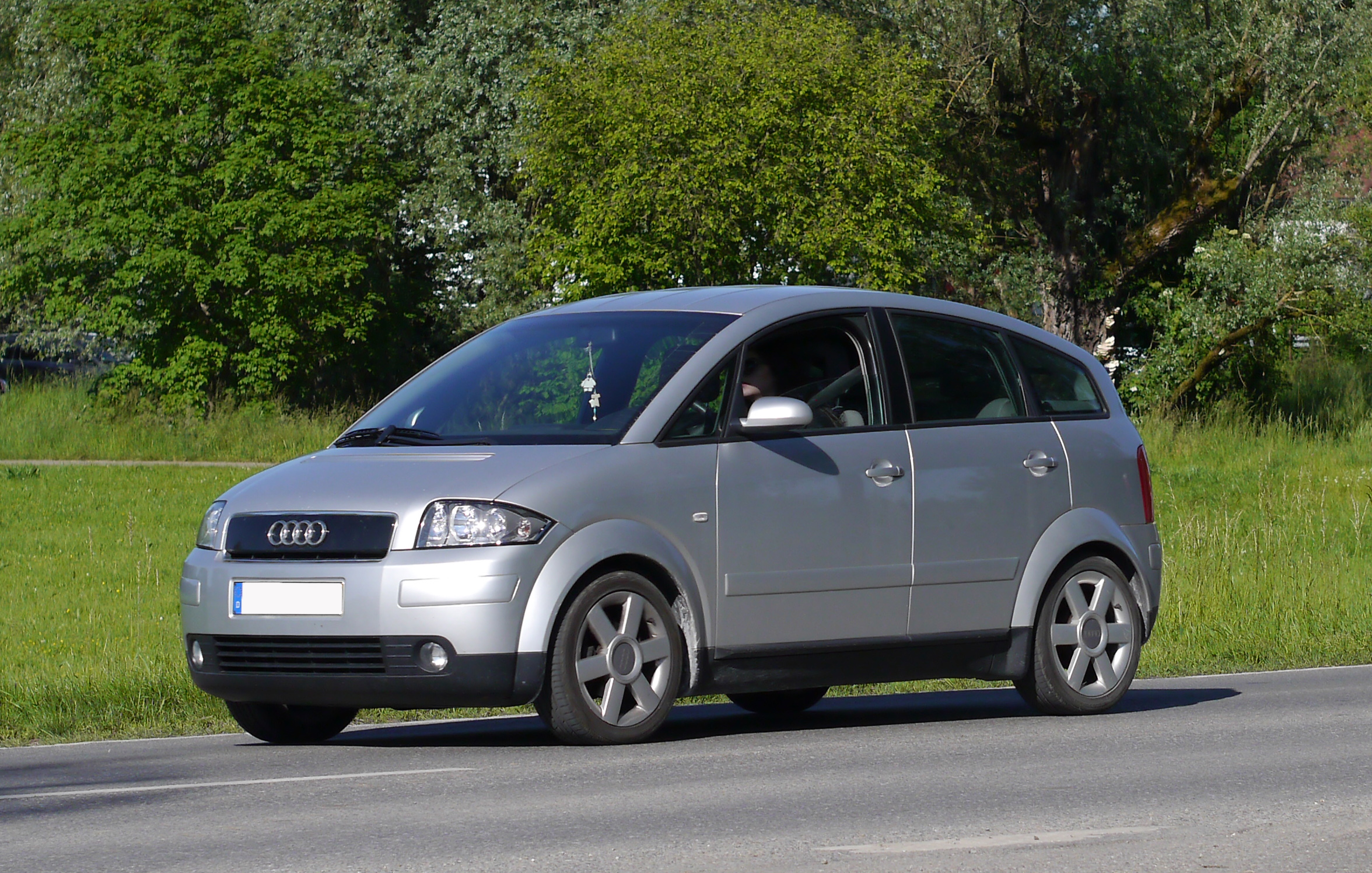 Audi A2 (8Z)